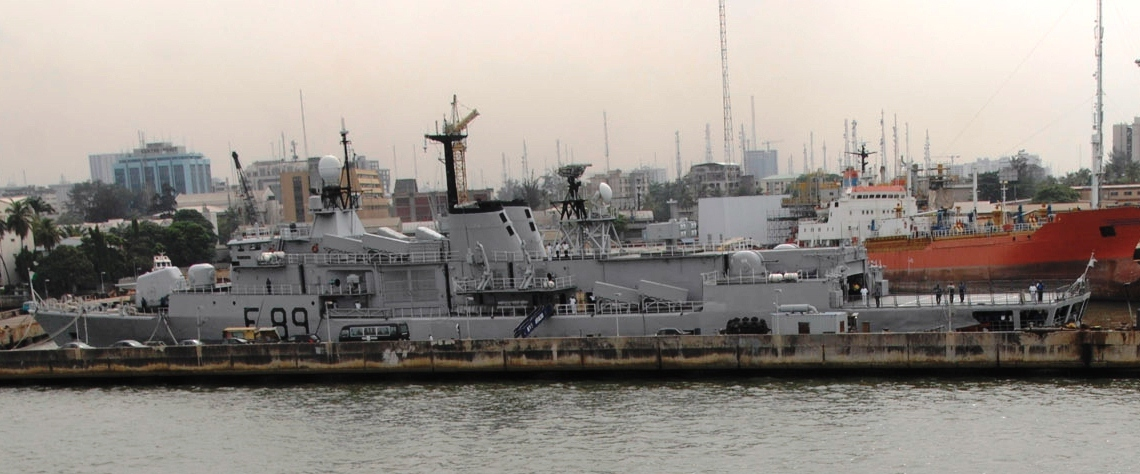 Nigerian frigate Aradu